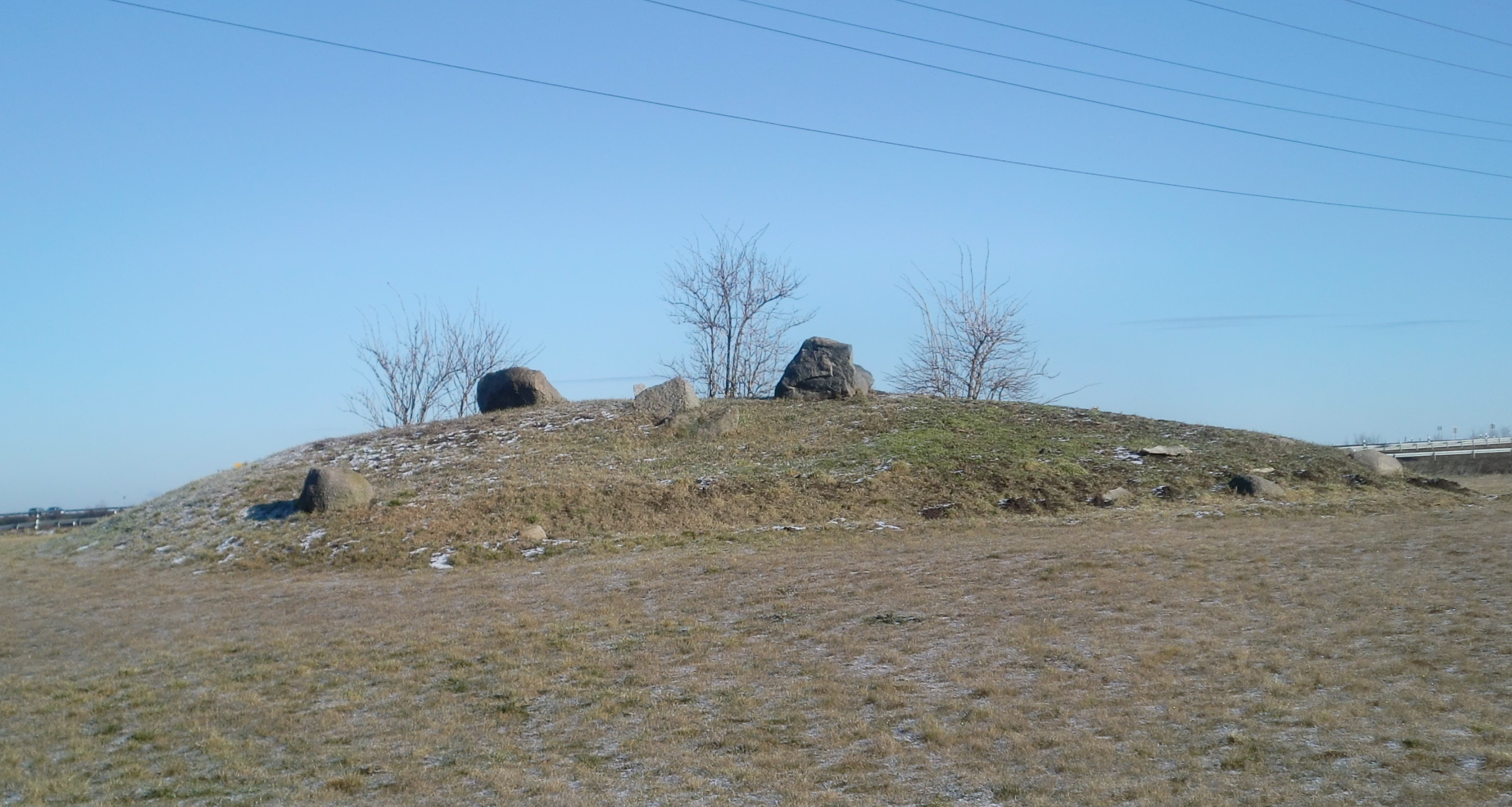 Pfahlberg, Grabanlage nördlich von Magdeburg